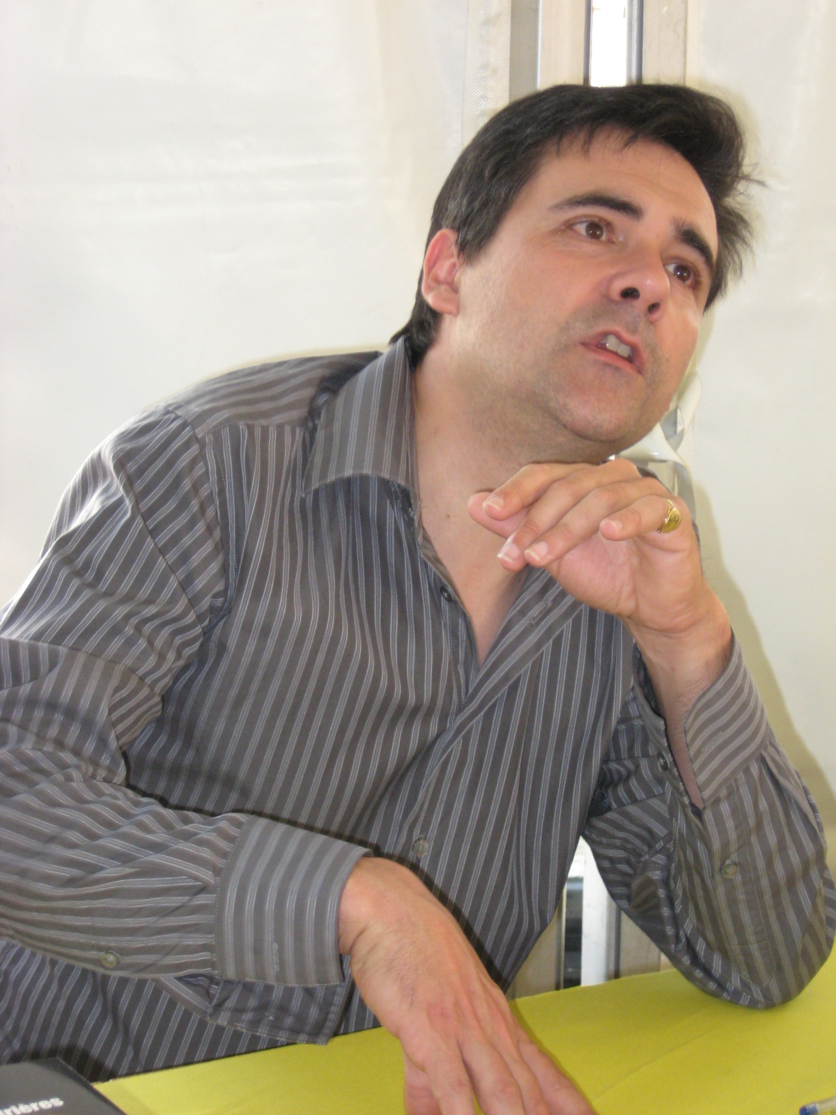 Portrait de Jacques Ravenne par Jean-Marie DAVID lors du Festival International du Roman Noir de Frontignan (France).